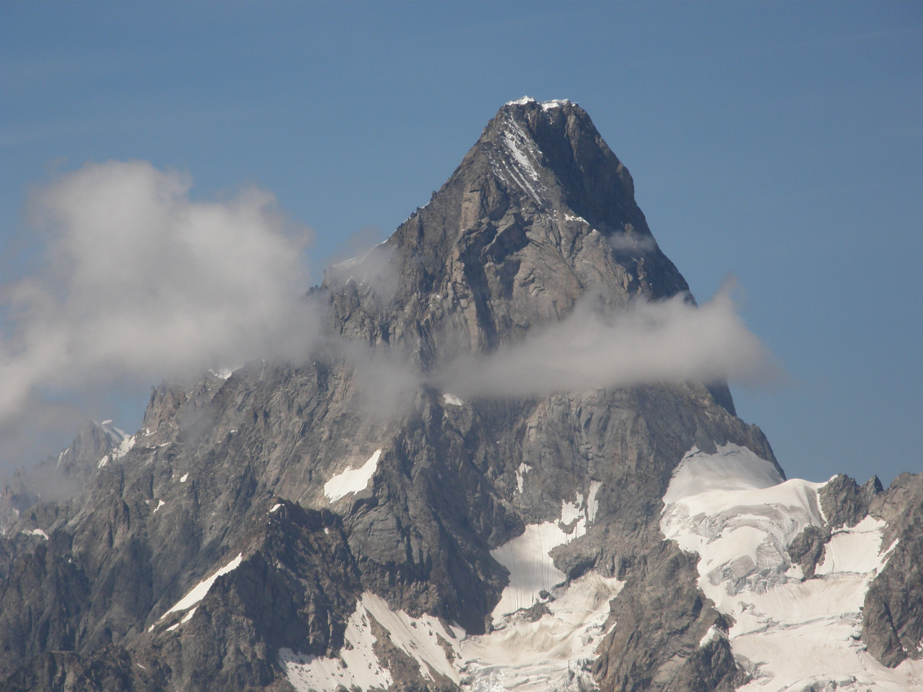 Punta Walker This is a photo of a monument which is part of cultural heritage of Italy.